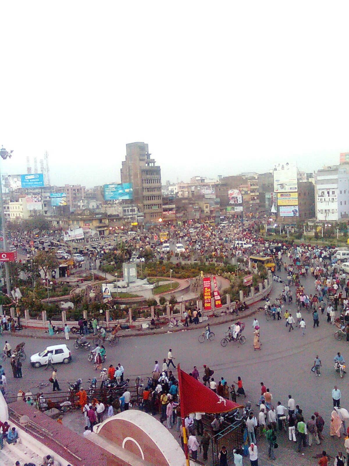 पटना